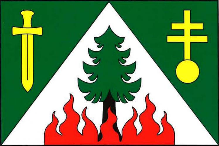 vlajka, Žárovná, okres Prachatice